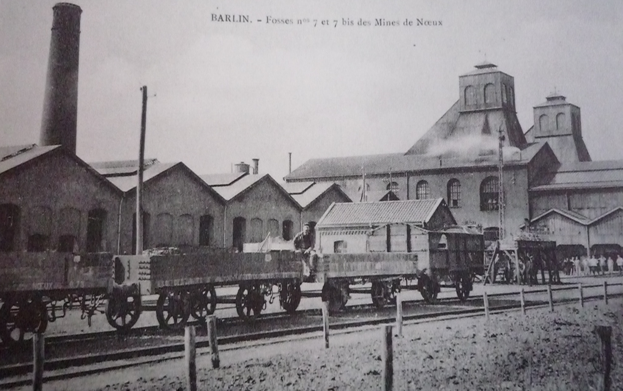 La Fosse n° 7 - 7 bis de la Compagnie des mines de Nœux était un charbonnage constitué de deux puits situé à Barlin, Pas-de-Calais, Nord-Pas-de-Calais, France.